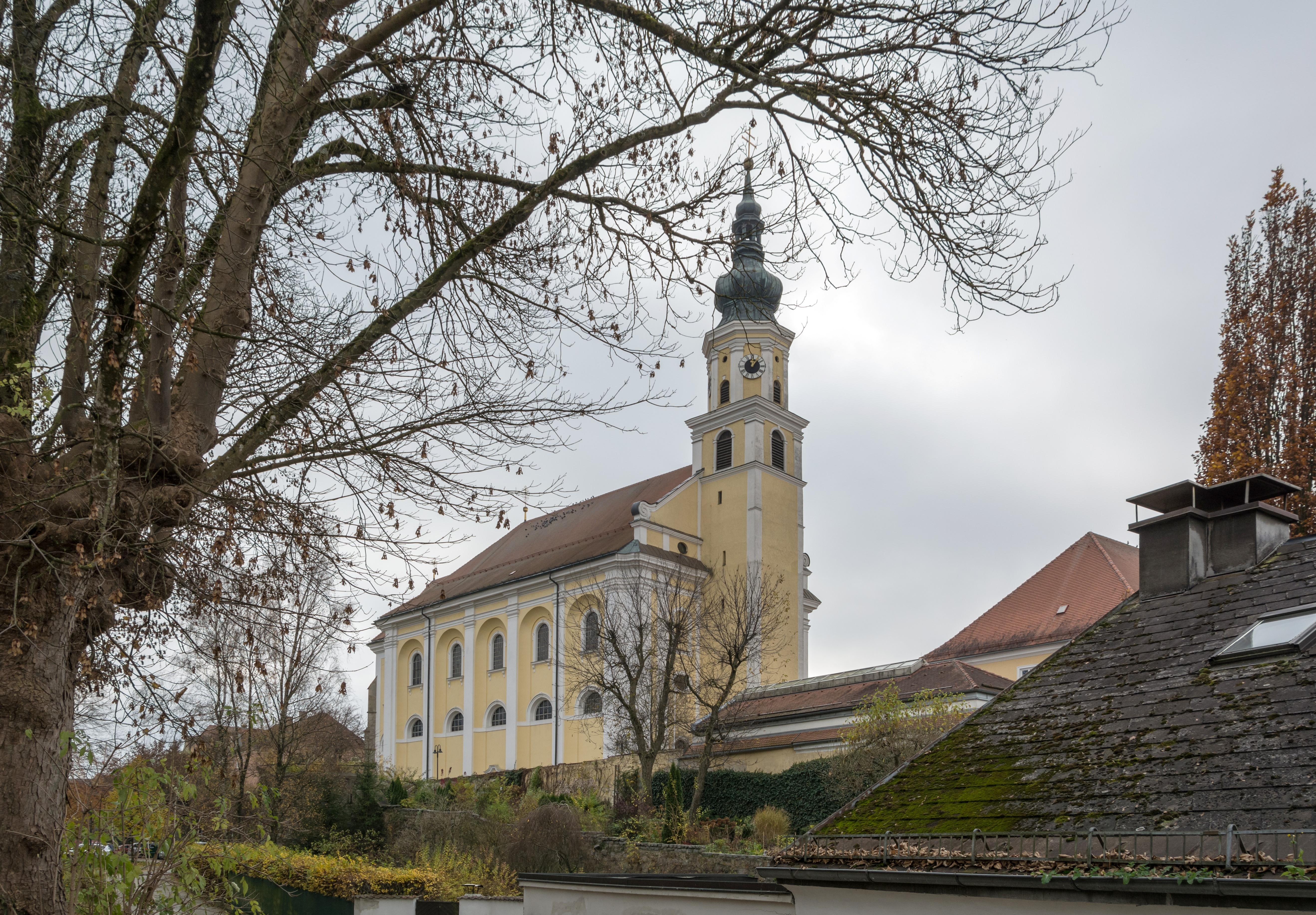 Kath. Pfarrkirche hl. Georg und Kirchhof